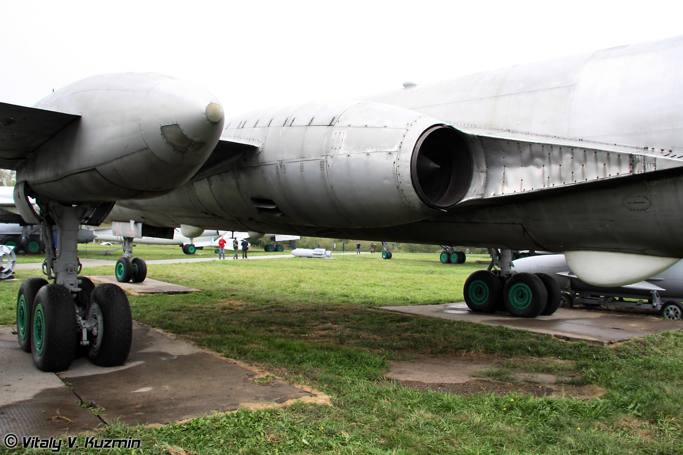 Ту-16Р (Tu-16R)